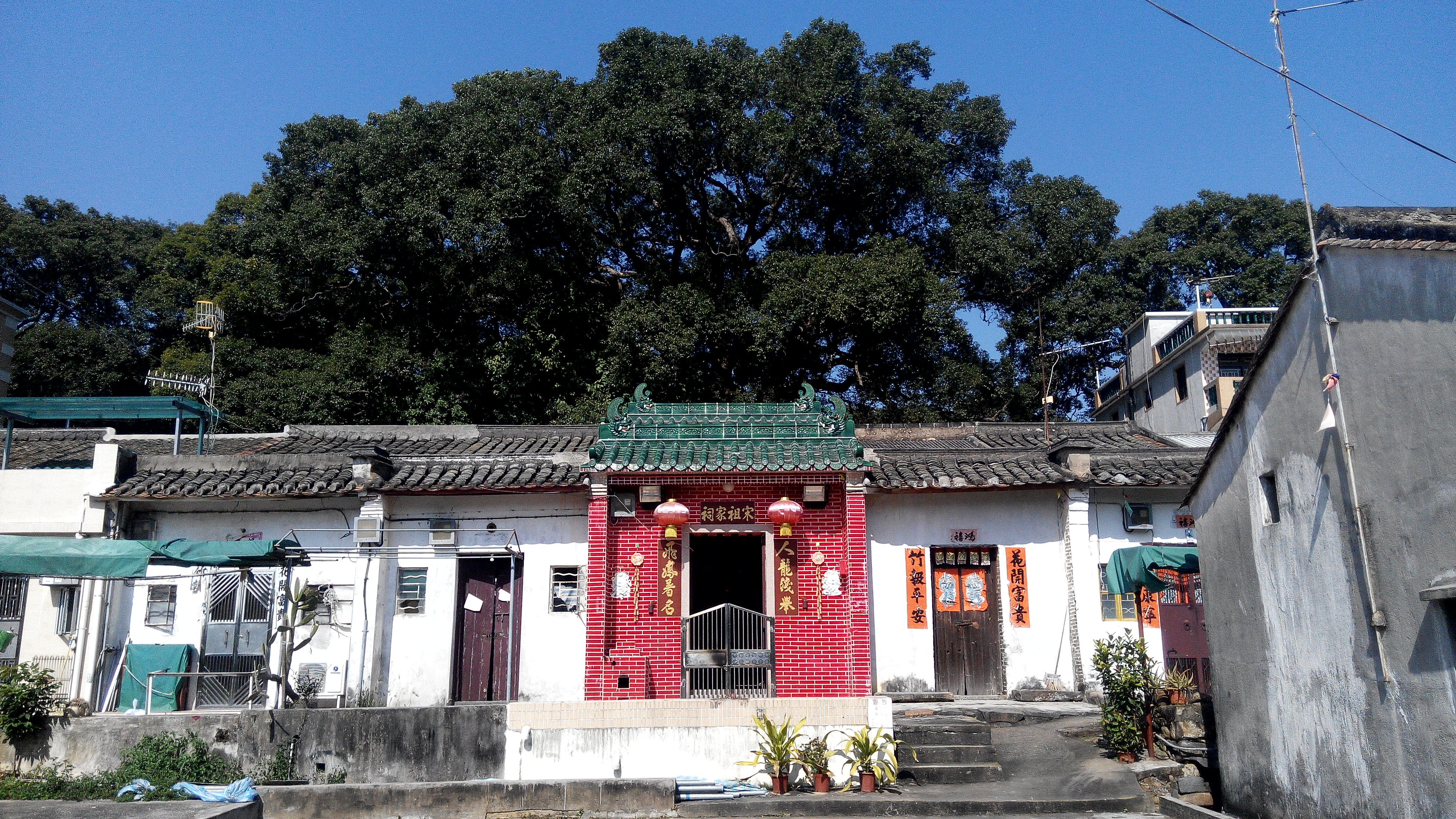 蓮塘尾村宋祖家祠